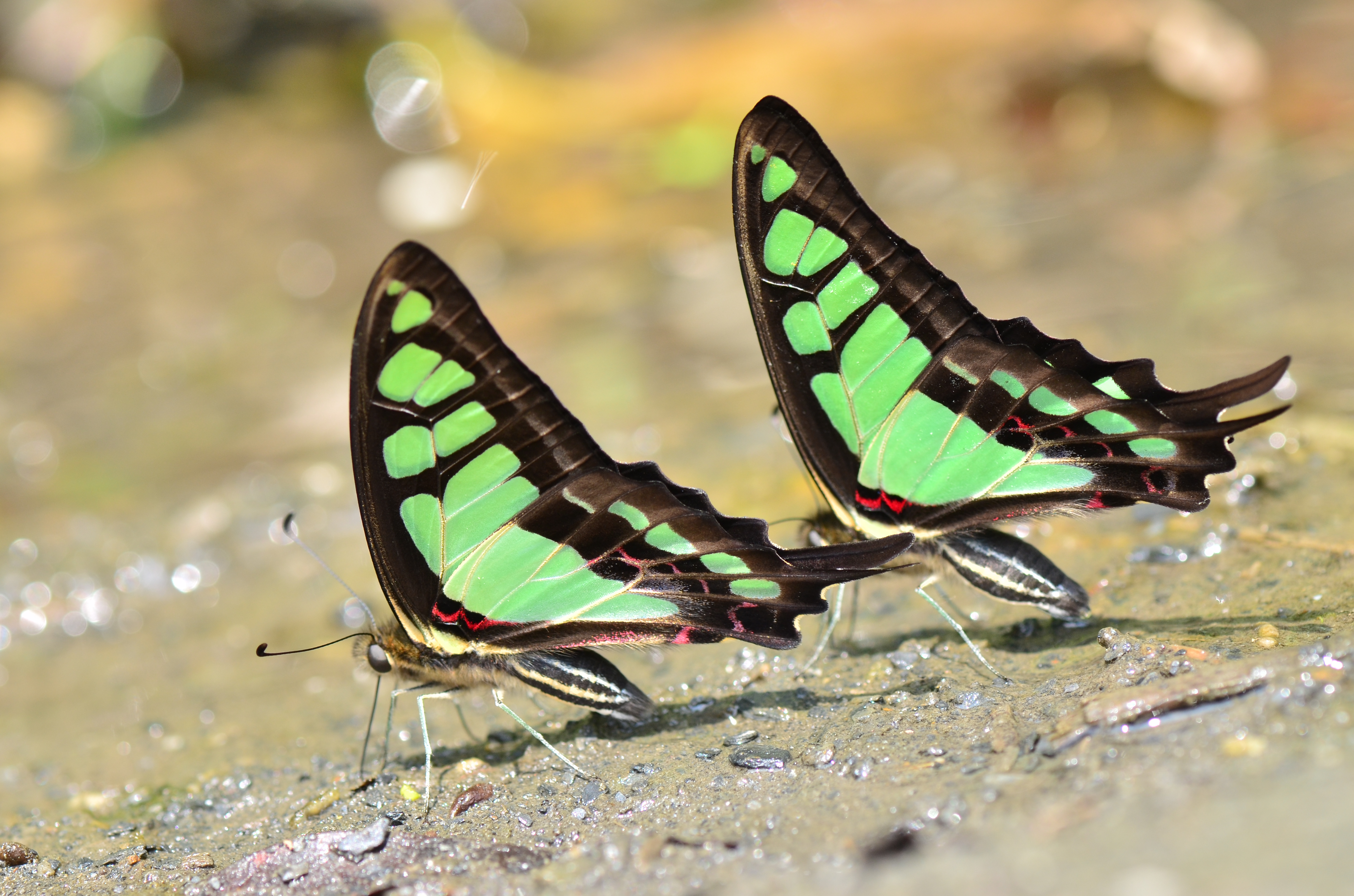 81寬青帶鳳蝶4(李榮芳攝)